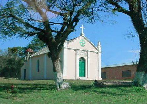 Descrição Capela de São Roque na comunidade de mesmo nome no interior de Mata/RS Fonte Foto original Licença Categoria:Cidades